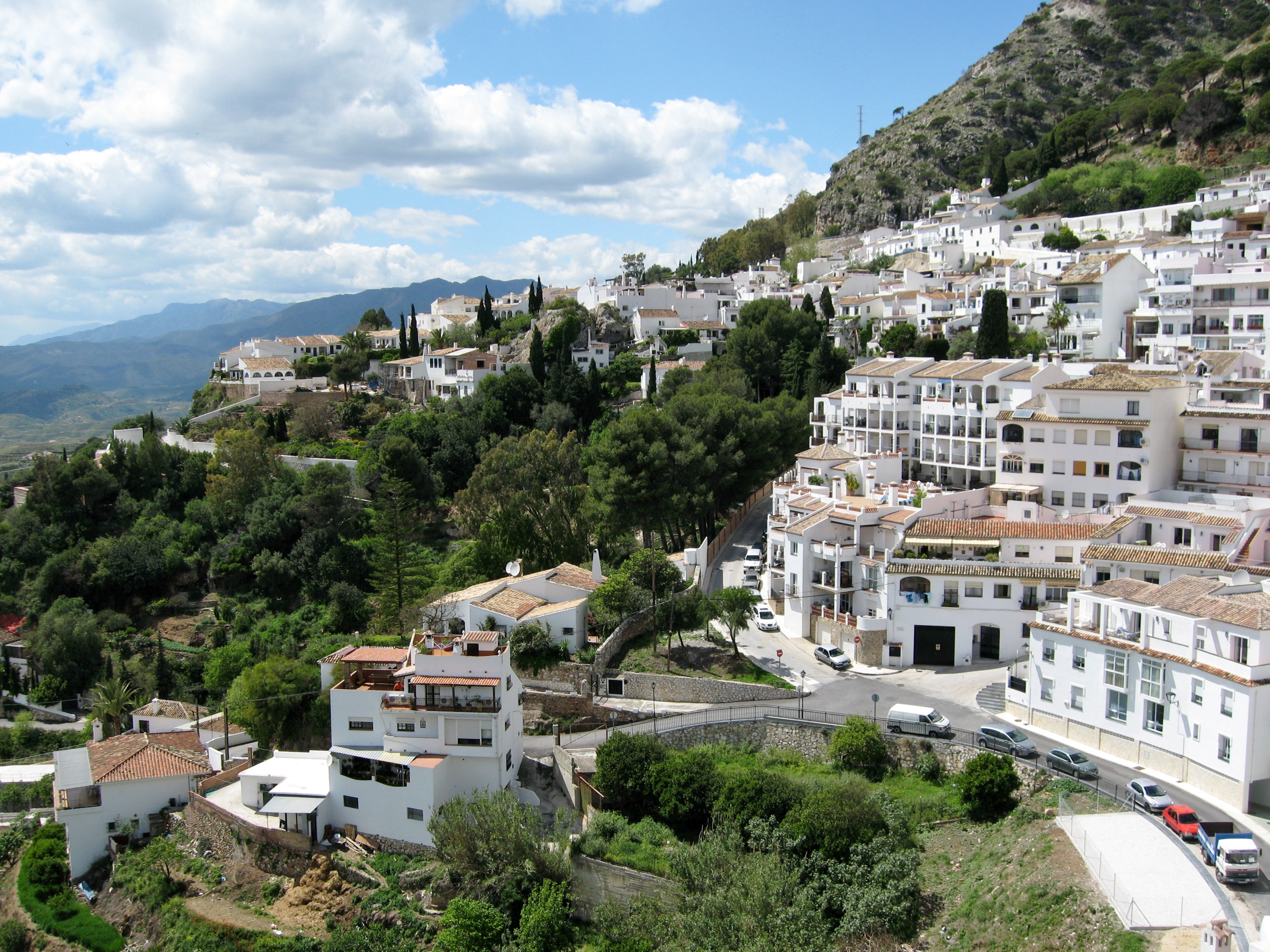 Mijas (Calle Cristobal Alarcon), Provinz Málaga, Andalusien, Spanien.